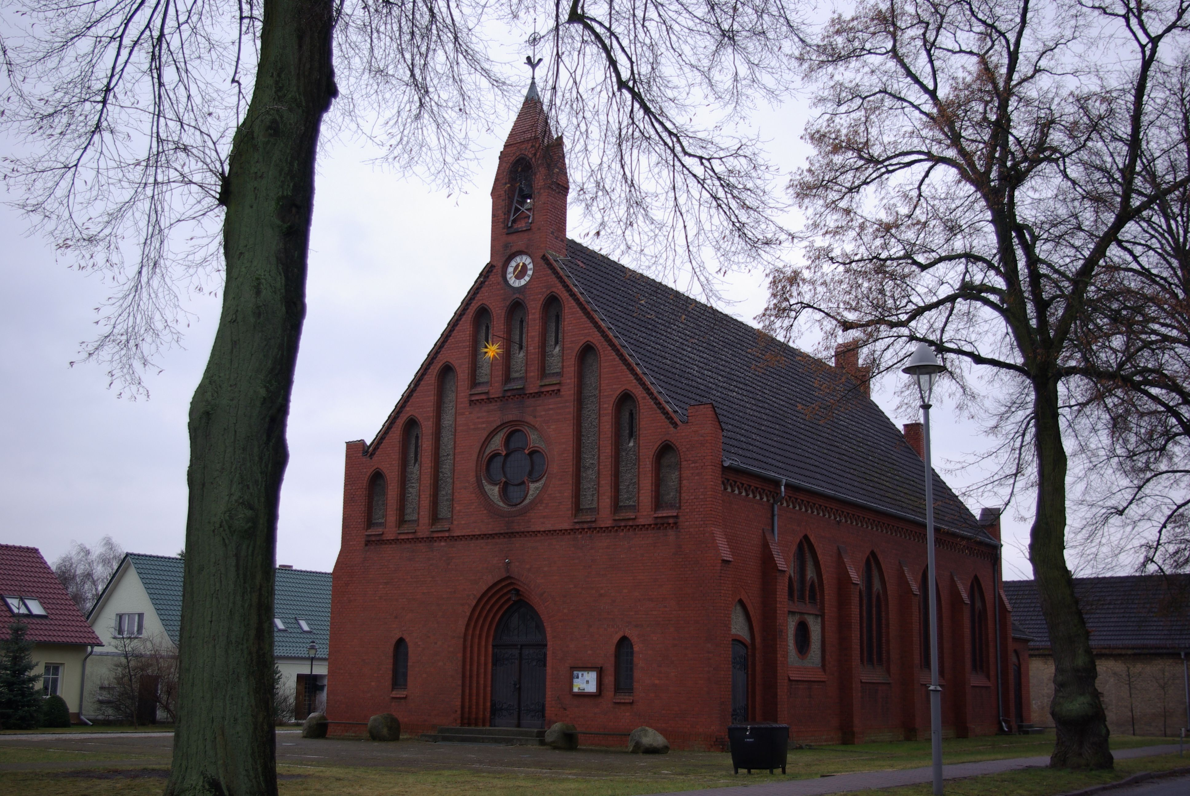 Mittenwalde Ortsteil Töpchin in Brandenburg. Die Kirche steht unter Denkmalschutz.